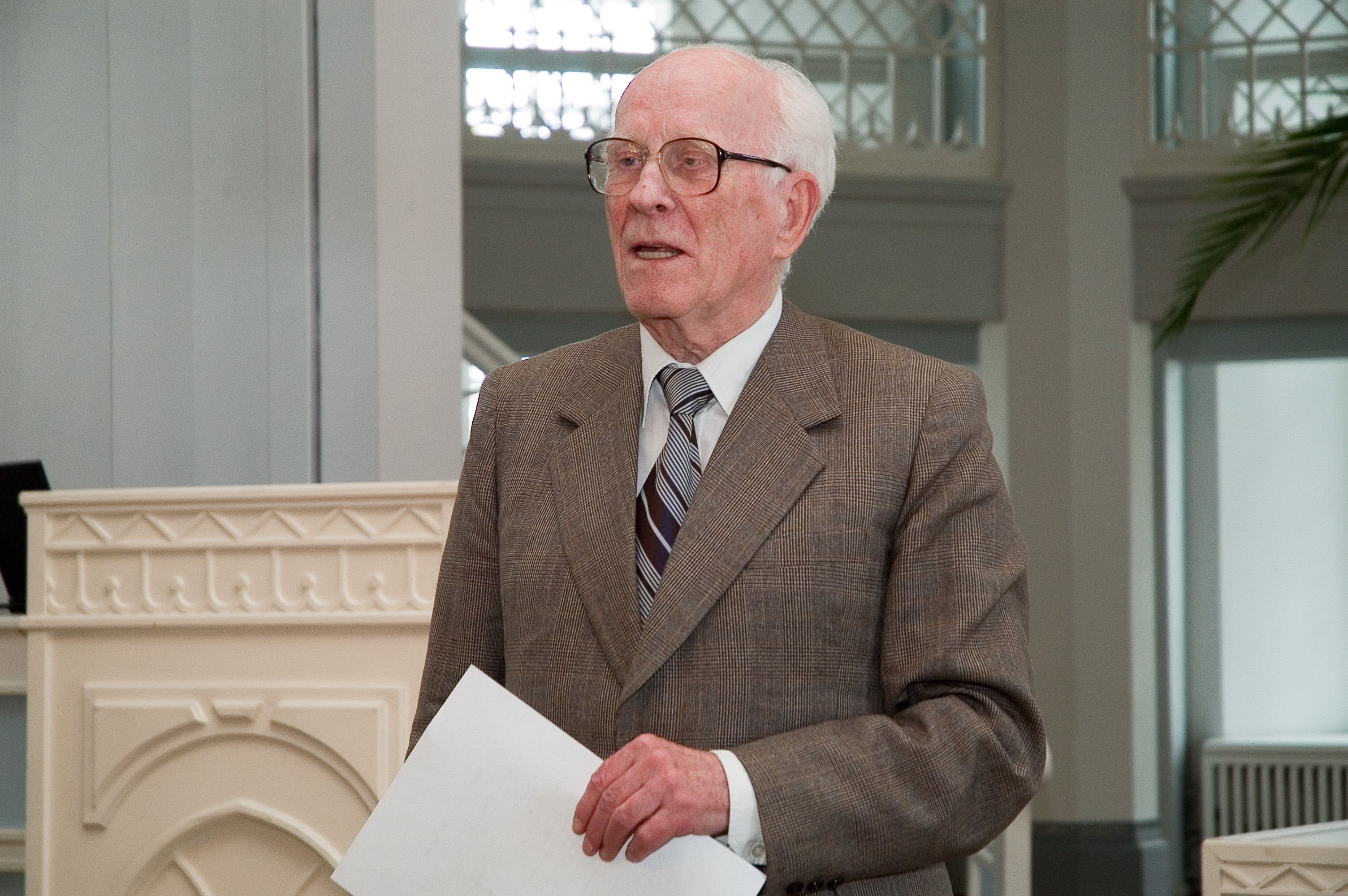 10. mail 2007 toimus TÜ ajaloo muuseumis teadusajaloopäev „60 aastat TÜ keemiaosakonna taastamisest“. Esineb TÜ füüsika-keemiateaduskonna emeriitprofessor Vello Past ettekandega „Keemia osakonna taastamine Tartus 1947. aastal ja selle esimesed aastakümned“.